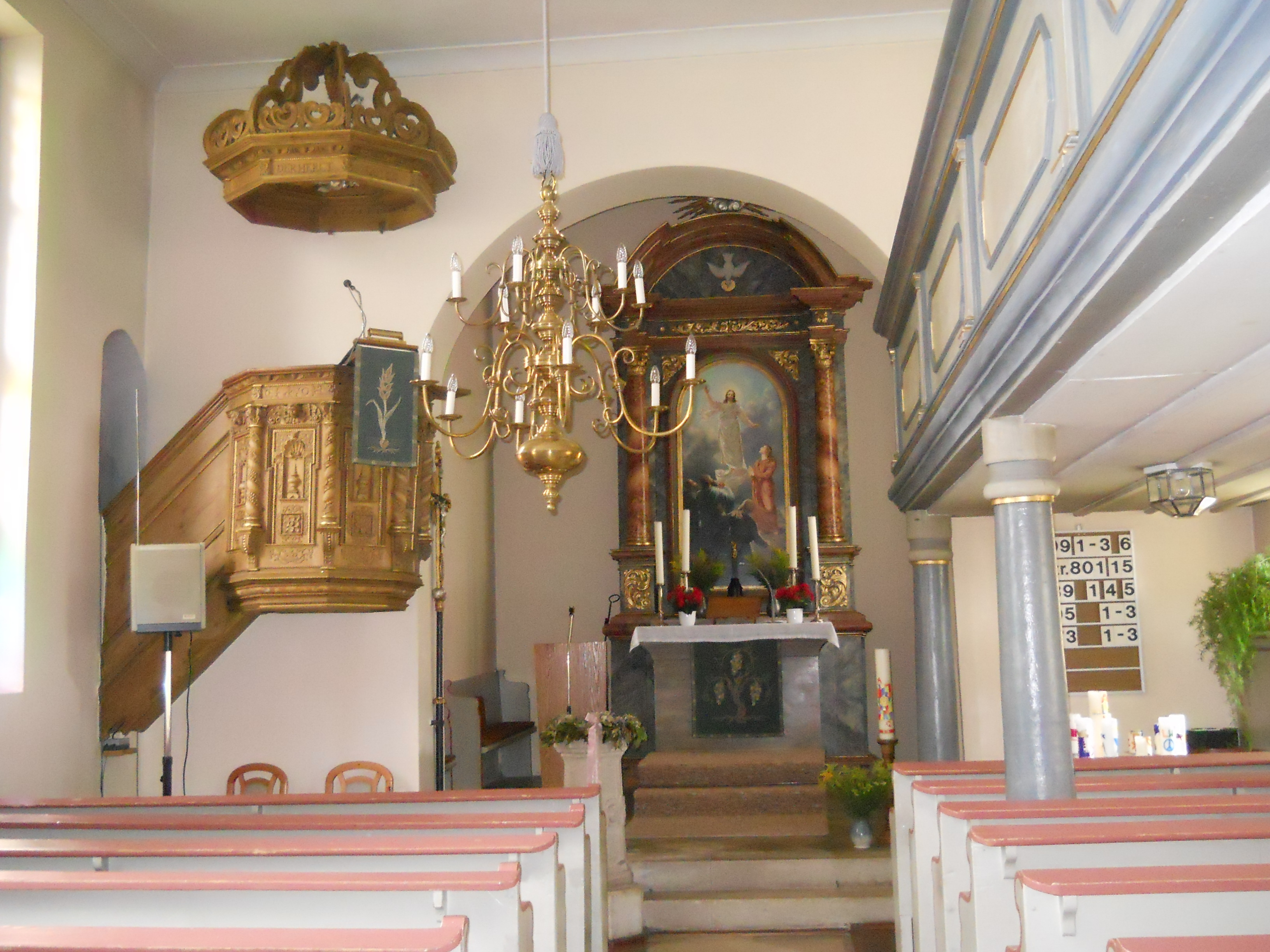 Schambach, Ortsteil von Treuchtlingen im mittelfränkischen Landkreis Weißenburg-Gunzenhausen, evang.-luth. Willibaldskirche